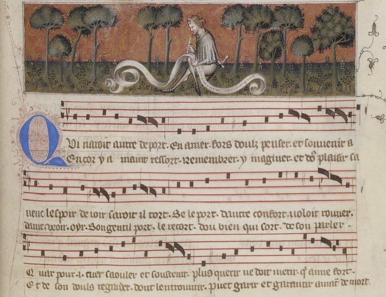 Paris, Bibliothèque Nationale, Fonds Français 1586